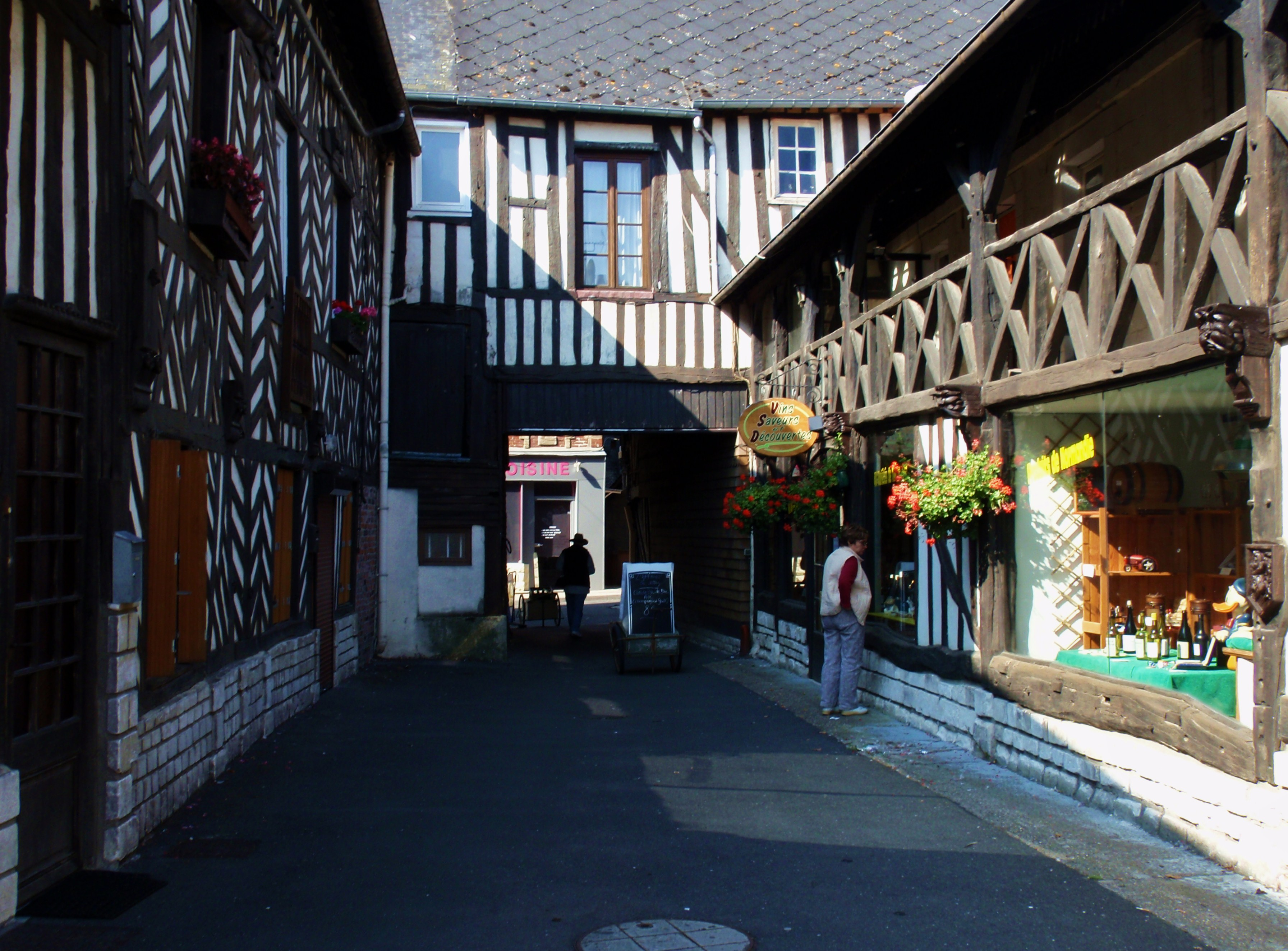 Cormeilles (Eure, France). Maisons à colombages, dans la rue Paul Mare ou une petite rue perpendiculaire.